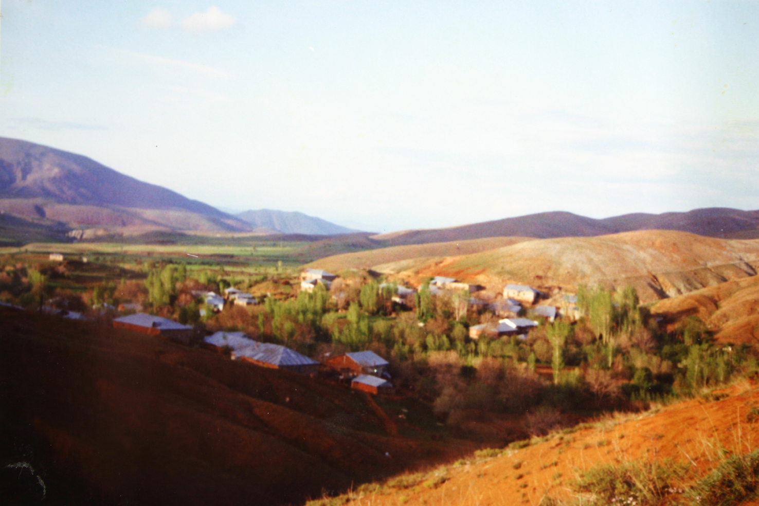 Tepecik Köyünden bir görünüm